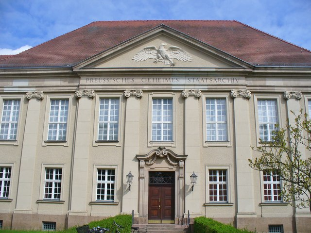 Preussisches Geheimes Staatsarchiv (Prussian Privy State Archives)